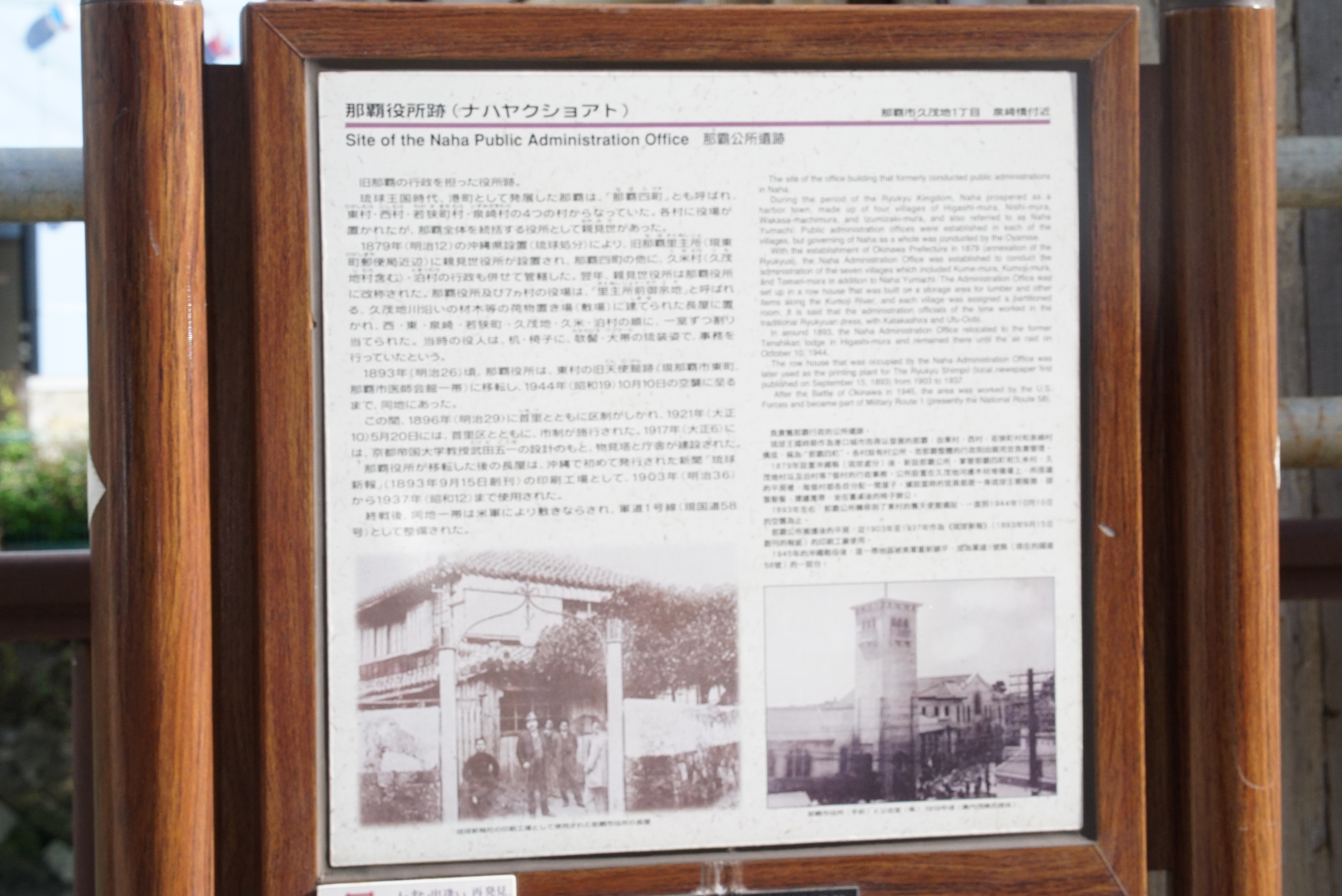 那覇役所跡について、当時の様子と歴史をまとめたもの